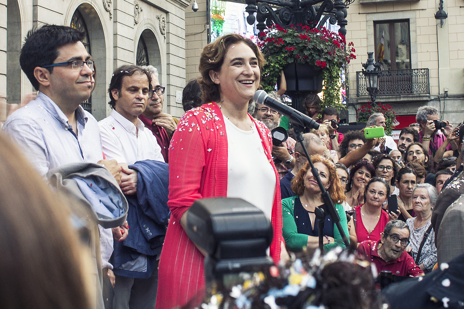 Plaça Sant Jaume 13/06/2015 Foto: Marc Lozano Investiture of Ada Colau, 14 June 2015, Barcelona